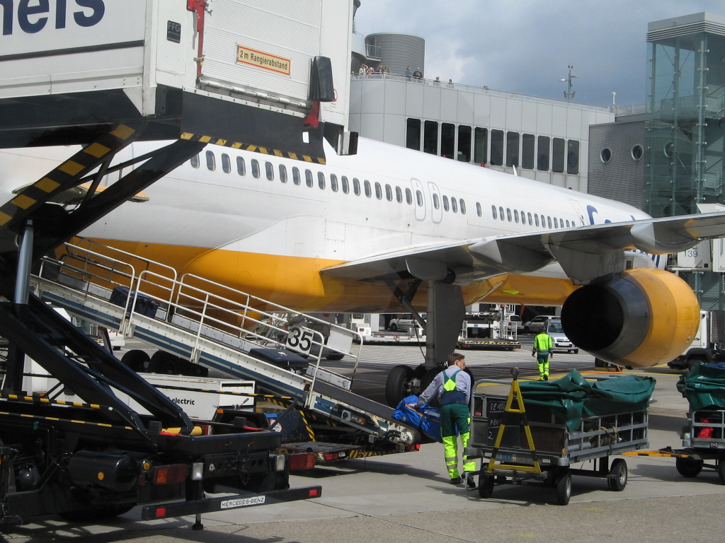 Flugzeug wird am Flughafen Düsseldorf entladen